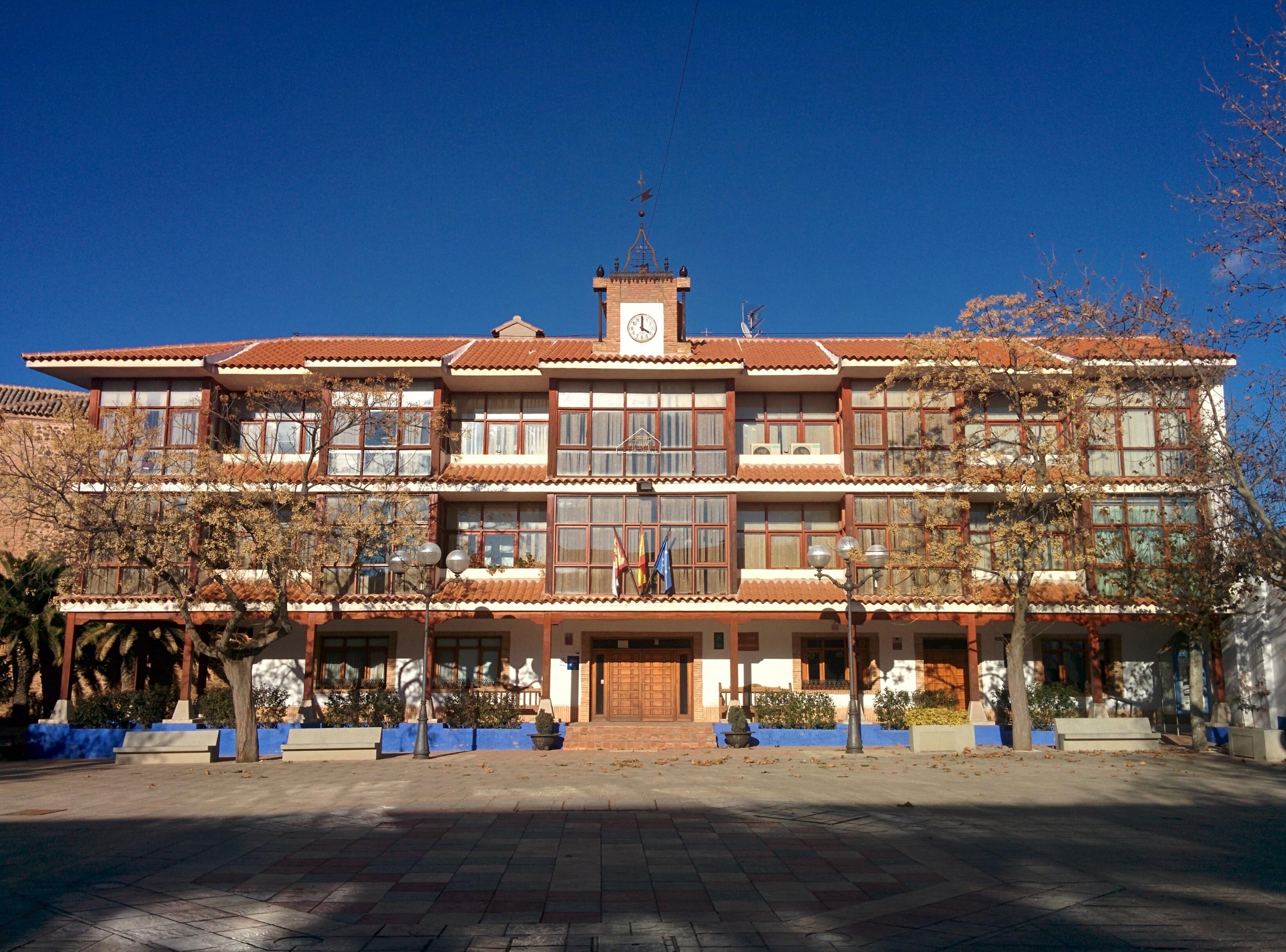 Casa consistorial de Castellar de Santiago (Ciudad Real, España).